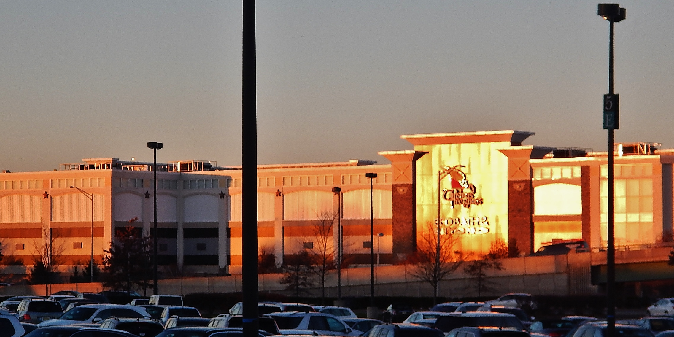 View from Westfield Garden State Plaza